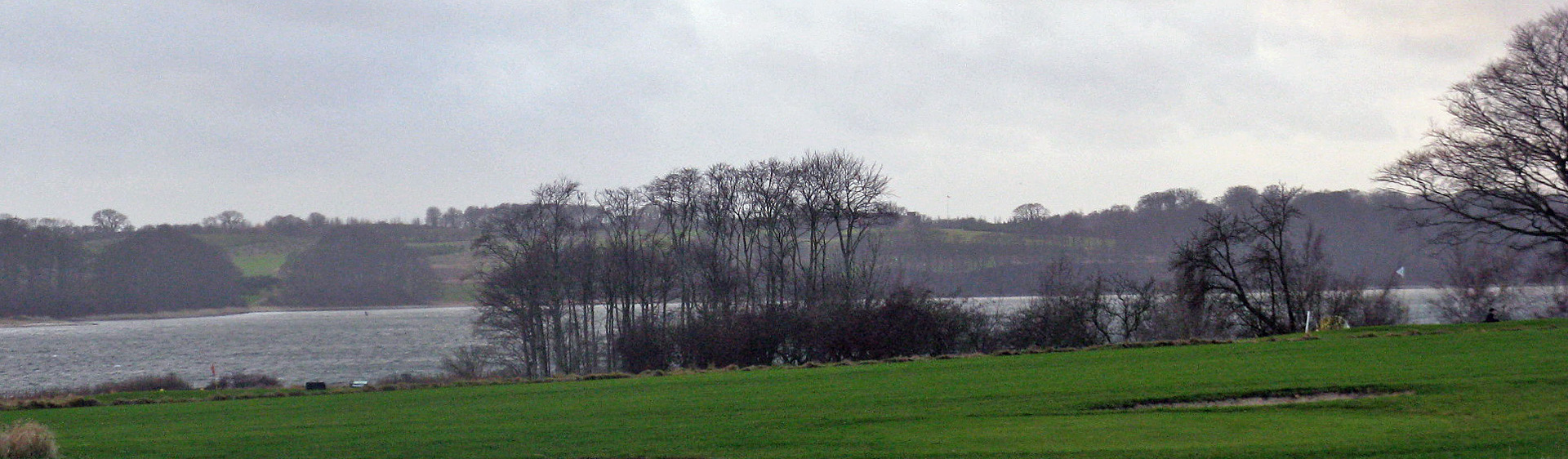 Fænø set fra øst over Fænøsund. Fænø er en ø på cirka 400 hektar, belligende i Lillebælt sydvest for Middelfart.